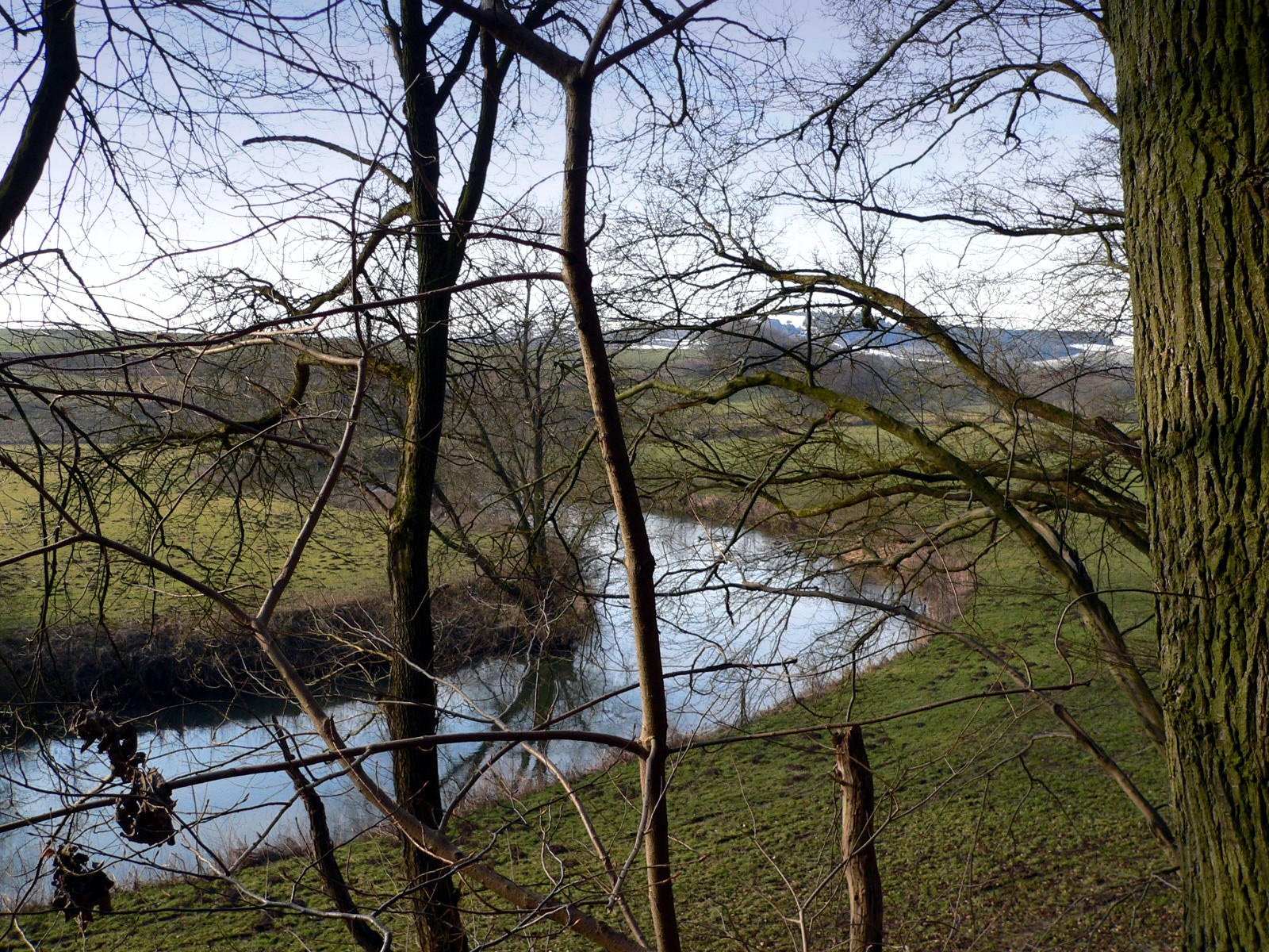 Die Diemel zwischen Trendelburg und Wülmersen Quelle: selbst fotografiert Fotograf: presse03 11:15, 20. Feb 2006 (CET) Datum: Februar 2006